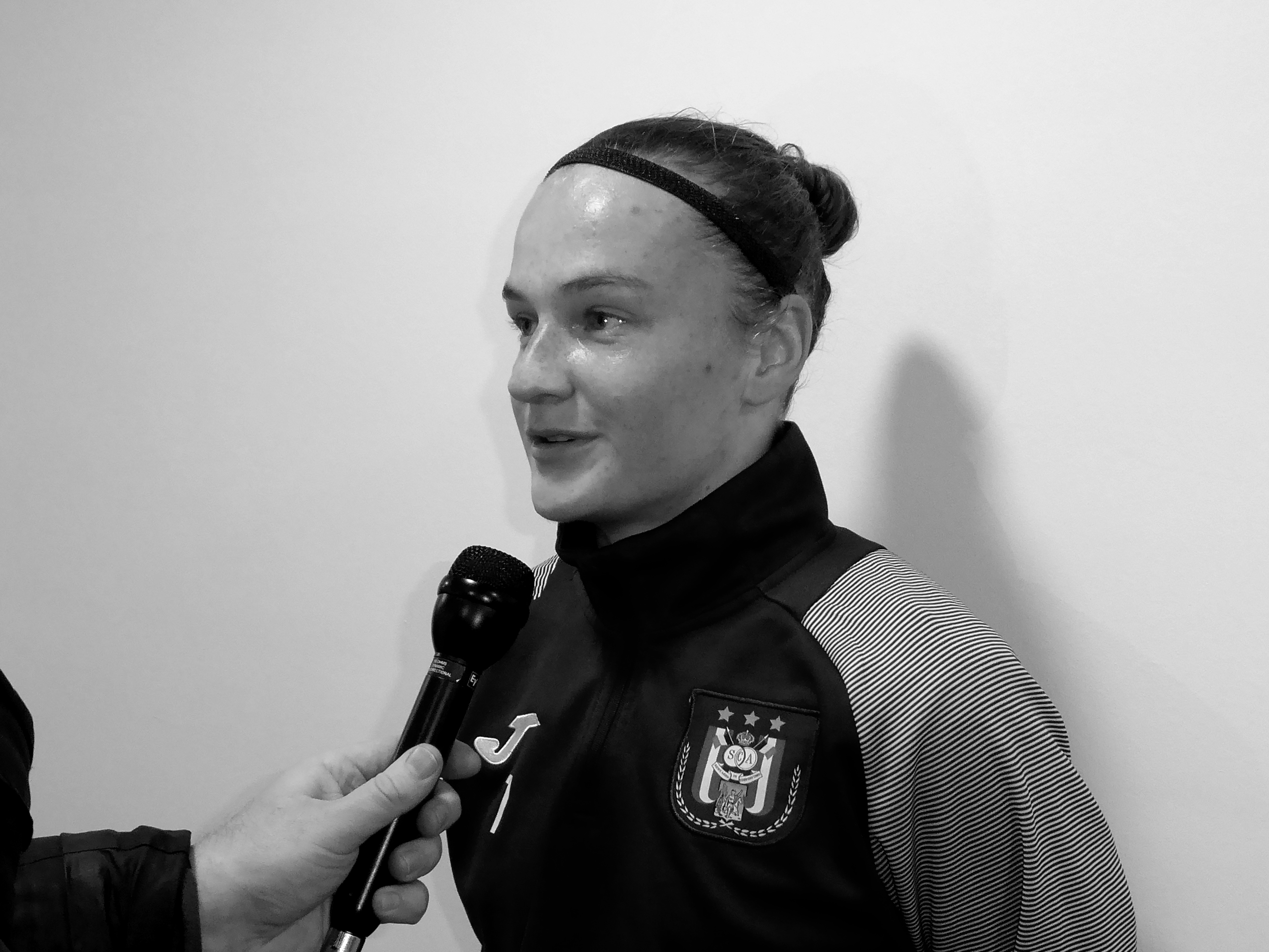 Elke Van Gorp en interview après le match entre le Standard de Liège (section féminine) et le RSC Anderlecht (section féminine le 1er novembre 2019.